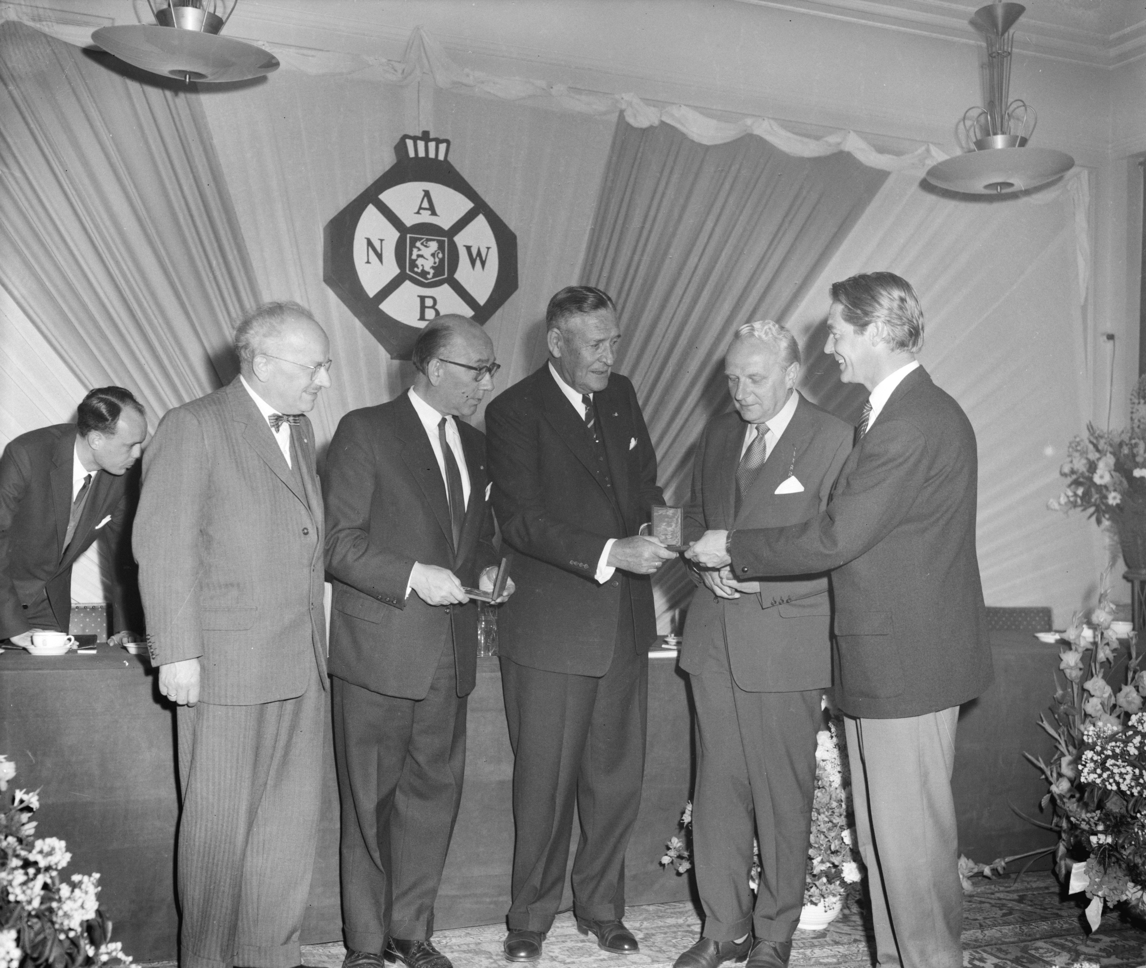 Eerste ANWB-prijs 1958. V.l.n.r. onbekende (gebogen), onbekende (juryvoorzitter? BJ Bertina?), Jan Engelman, P.F. Zimmerman (voorzitter ANWB), Aar van de Werfhorst, Bert Haanstra